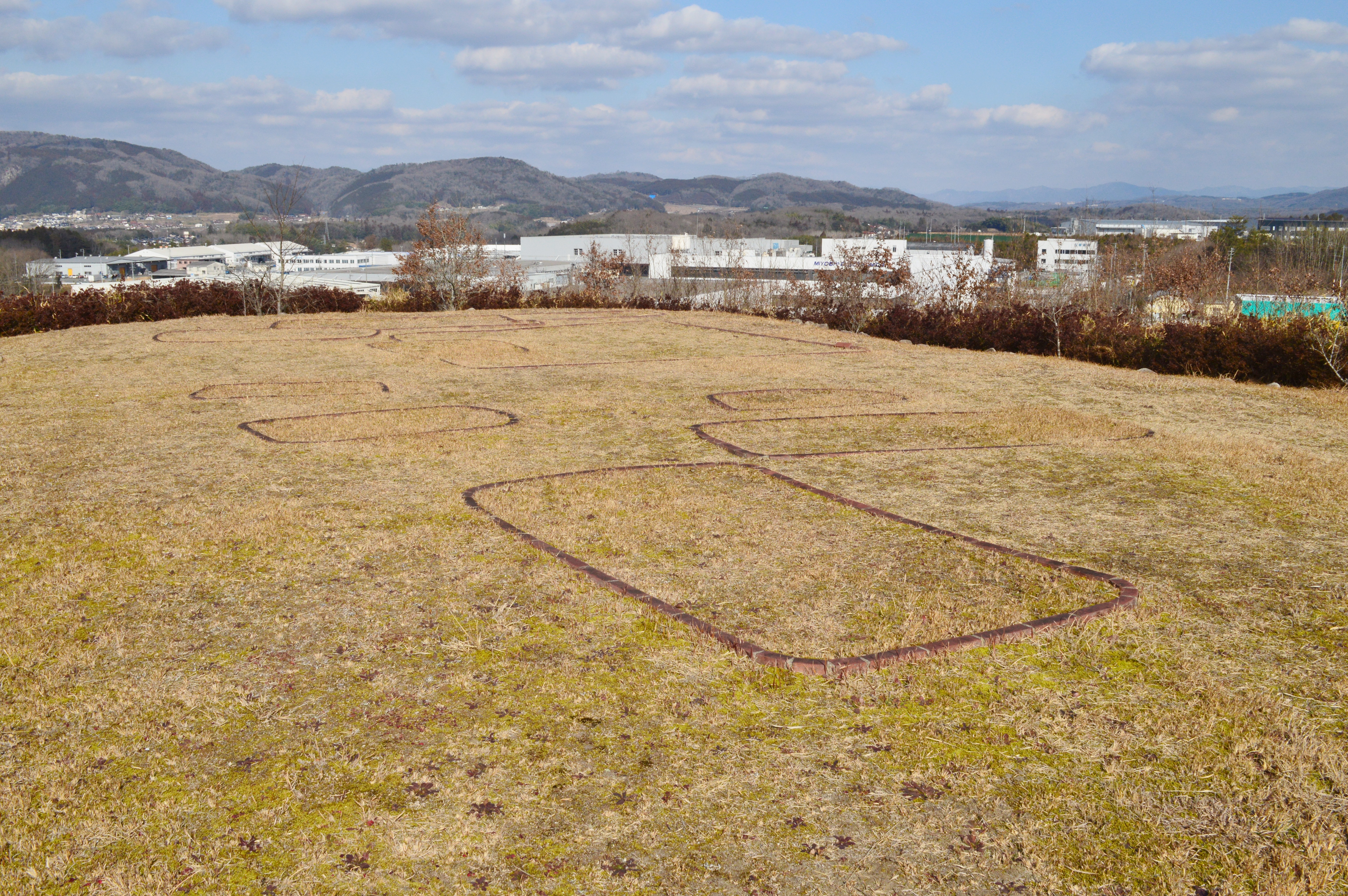 矢谷墳丘墓 墳頂 Nikon D3200